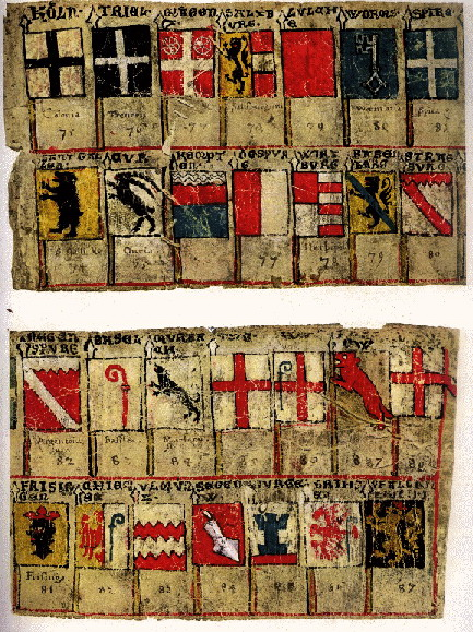 Zürcher Wappenrolle, Pergamentstreifen I Rückseite. 1. Reihe: I KOELN Erzbistum, II TRIEL Trier, Erzbistum, III MAEGENZ Mainz, Erzbistum, IV SALZBVRG Salzburg, Erbistum, V LVILCHE Lüttich, Bistum, VI WORMS Worms, Bistum, VII SPIRE Speier, Bistum 2. Reihe: XV SANT GALLEN St. Gallen, Kloster, XVI CVR Chur, Bistum, XVII KEMPTEN Kempten, Kloster, XVIII OvGSPVRG Augsburg, Bistum, XIX WIRZBVRG Würzburg, Bistum, XX BABENBERG Bamberg, Bistum, XXI STRASBVRG Strassburg, Bistum 3. Reihe: VIII REGENSPVRG Regensburg, Bistum, IX BASEL Basel, Bistum, X MVRBACH Murbach, Kloster, XI OWE Reichenau, Kloster, XII WI.. Wien ?, XIII PASSOW Passau, Bistum, XIV CONSTENZ Konstanz, Bistum 4. Reihe: XXII FRISINGEN Freising, Bistum, XXIII CHIEMSE Chiemsee, Bistum, XXIV VLMViNZ Olmütz, Bistum, XXV SEGGOW Seckau, Bistum, XXVI GVRGE Gurk, Bistum, XXVII BRIHSEN Brixen, Bistum, XXVIII PFALLENZ VOM RIN Pfalzgraf am Rhein